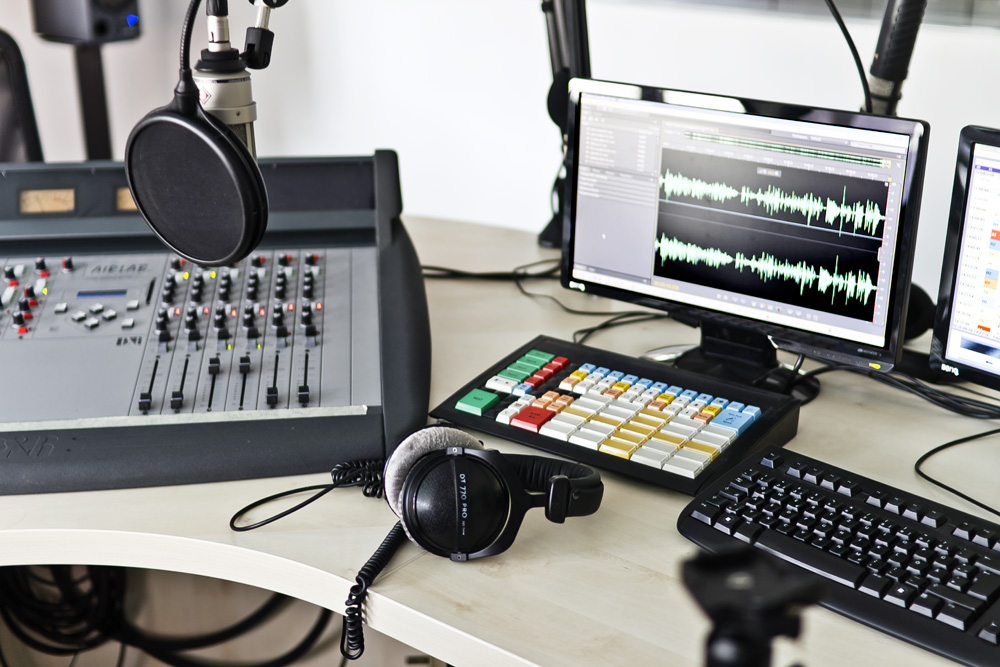 Ein Blick ins das detektor.fm-Studio in Leipzig.